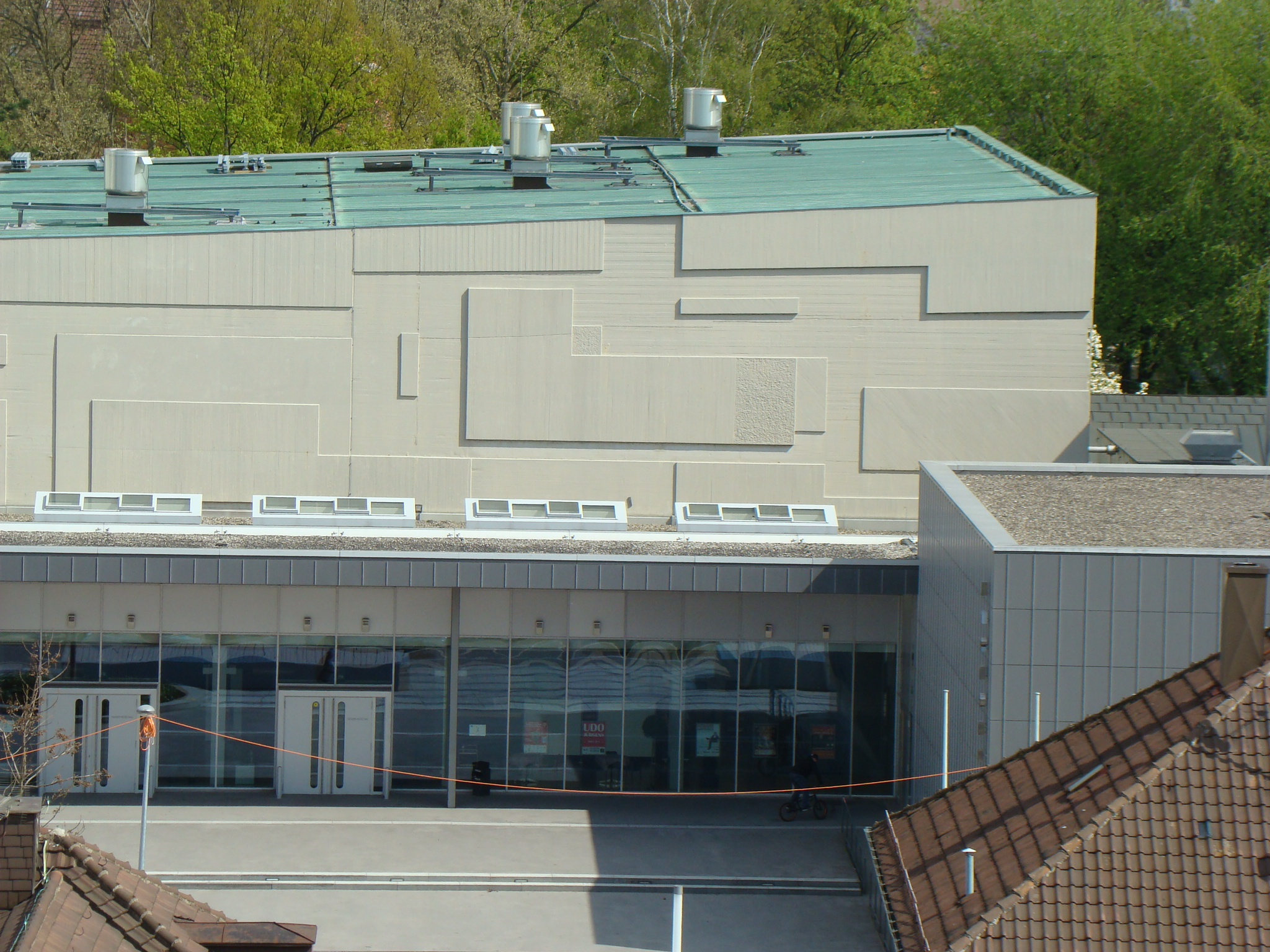 Festhalle Harmonie in Heilbronn, Fassadendetail